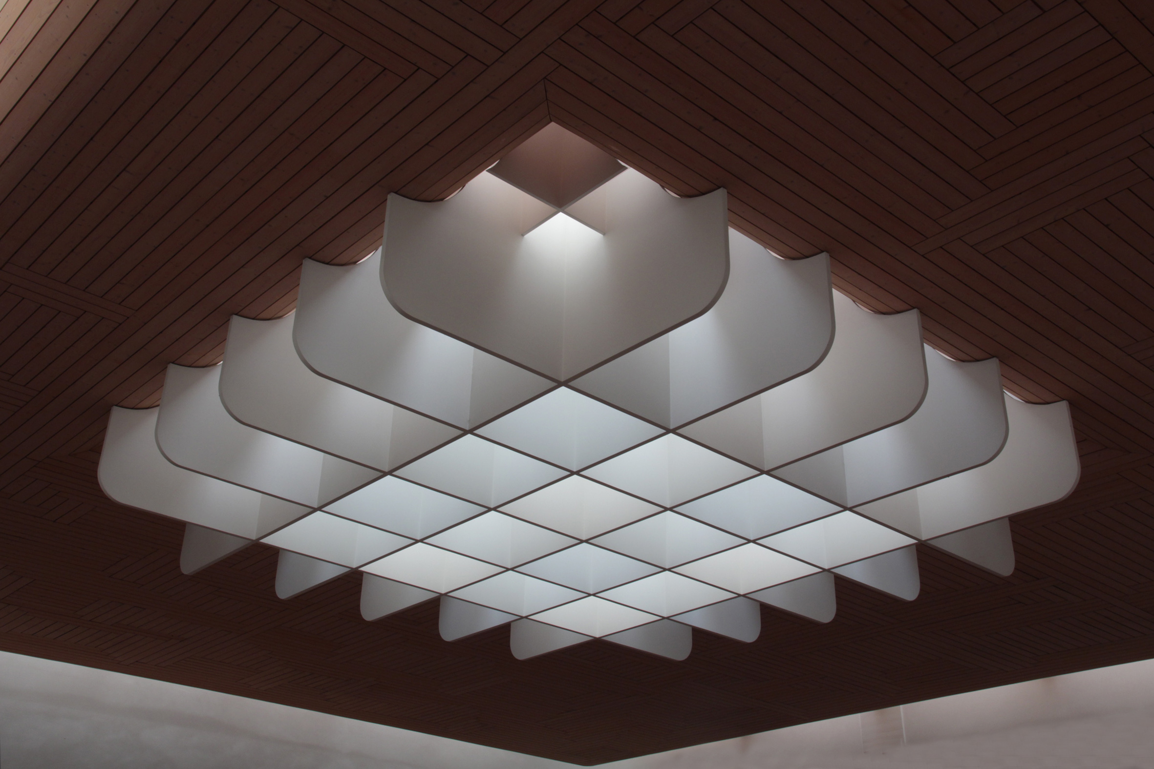 Römisch-katholische Kirche Maria Hilf, Zürich-Leimbach